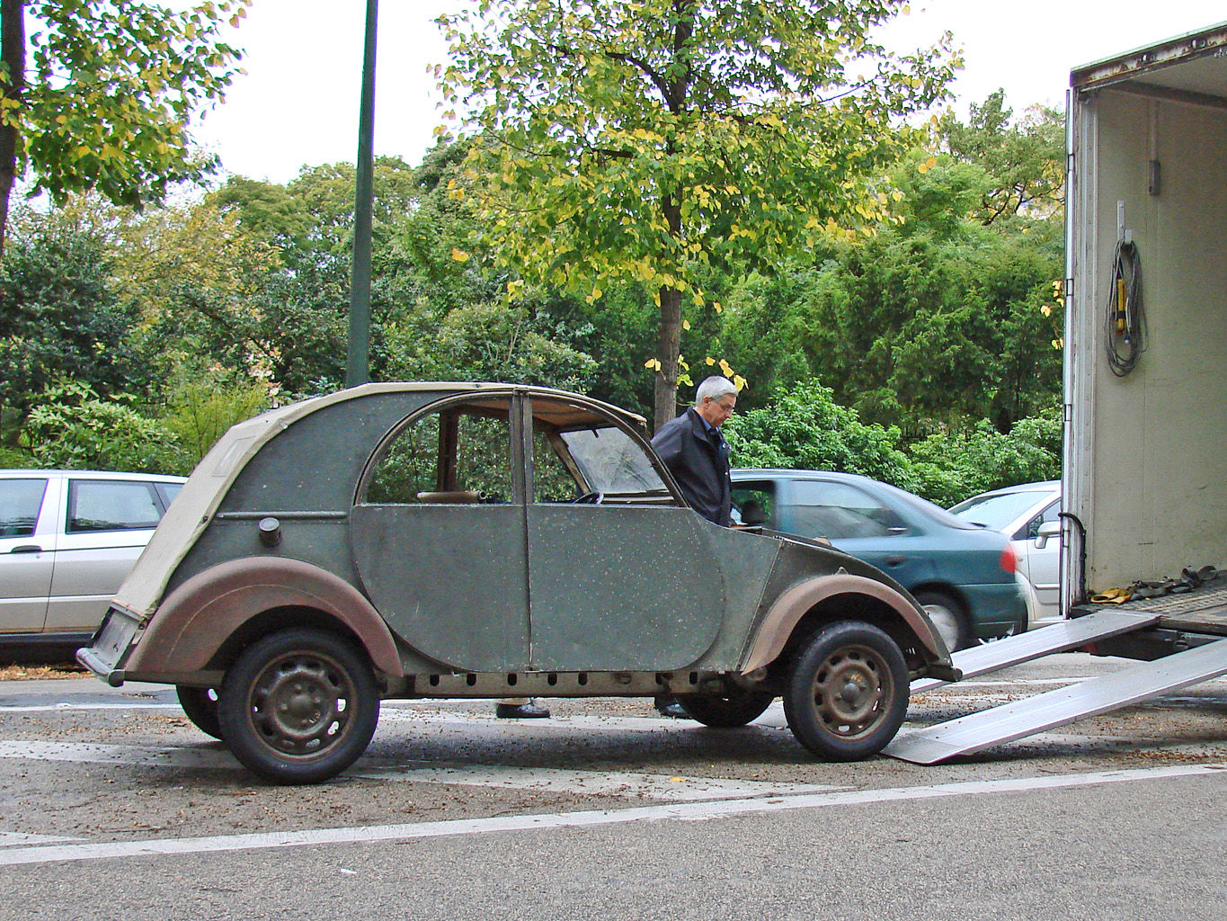 "Le dessin de la 2 CV traduit un bel équilibre. Les fenêtres symétriques en sont l’élément le plus visible.